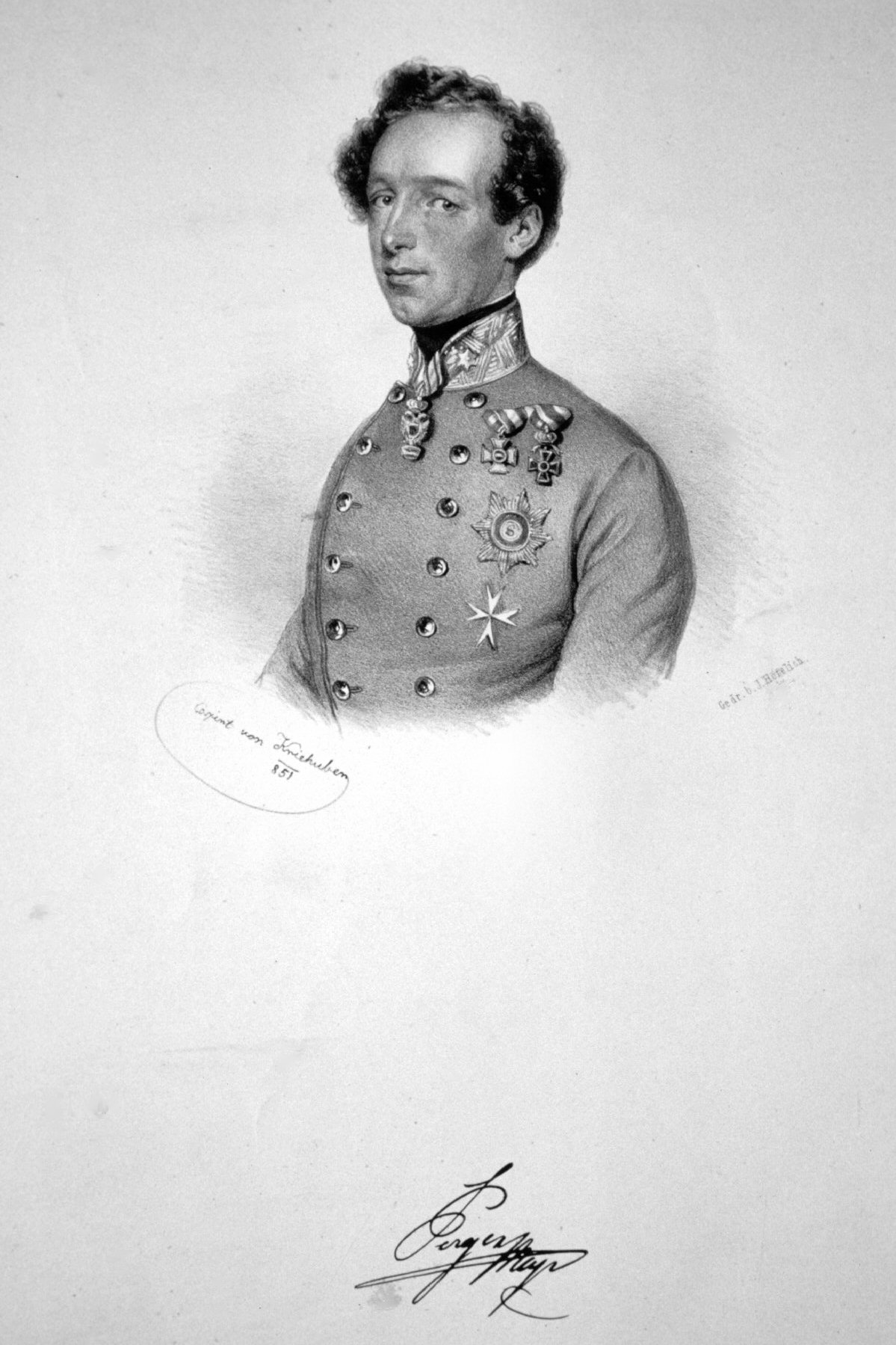 Ludwig Graf PErgen (1805-1860), Generalmajor, Ritter des Maria-Theresien-Ordens. Lithographie von Josef Kriehuber, 1851